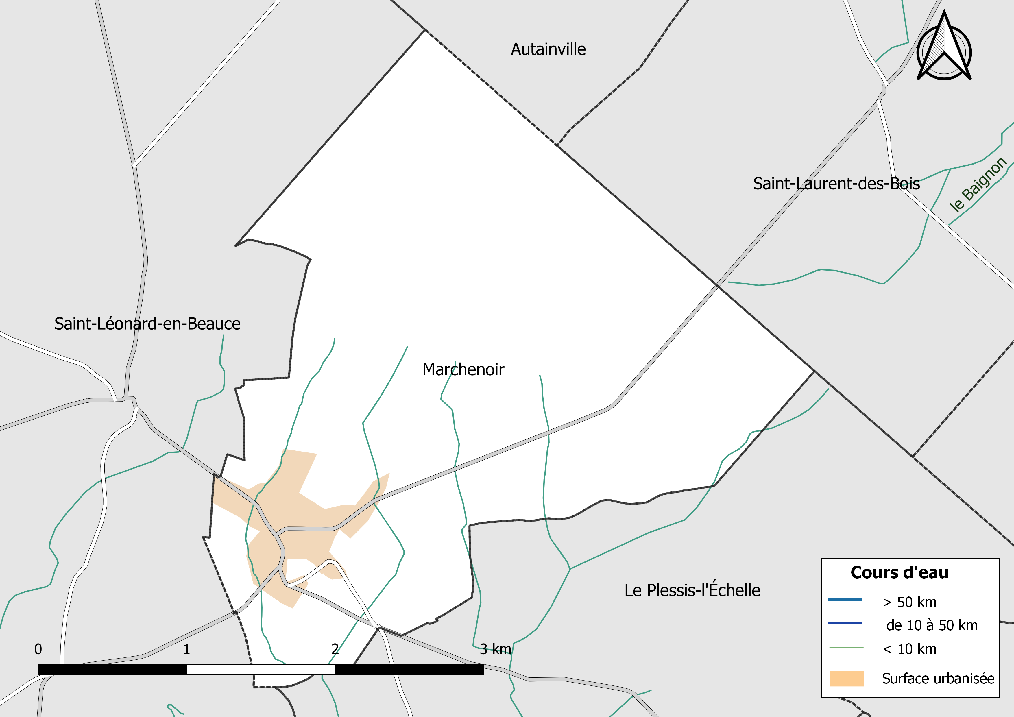 Carte du réseau hydrographique de la commune de Marchenoir (Loir-et-Cher, France).